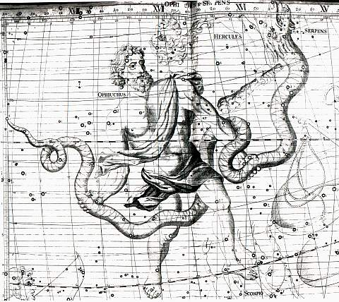 Ophiuchus